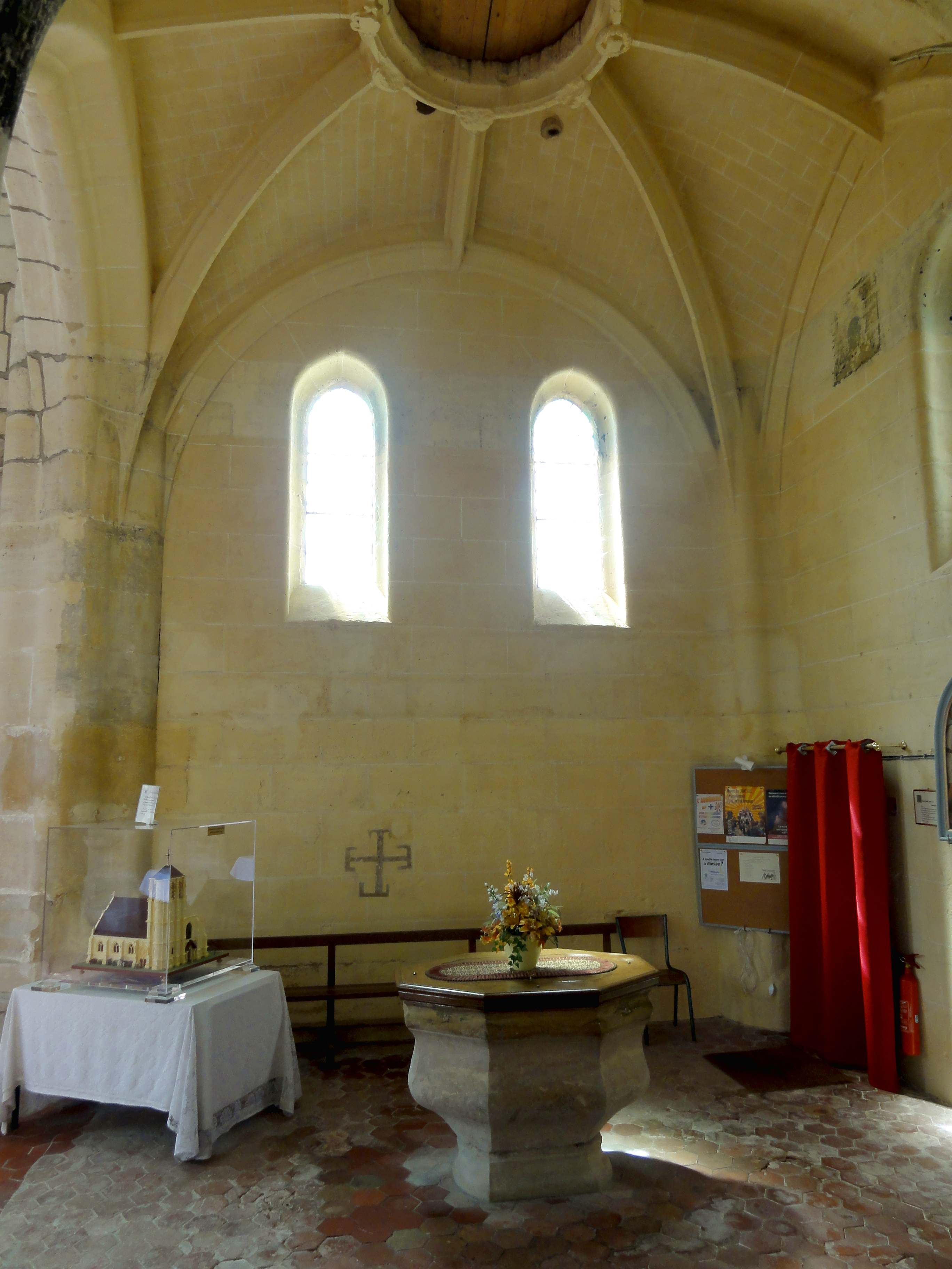 Intérieur de l'église - voir titre.